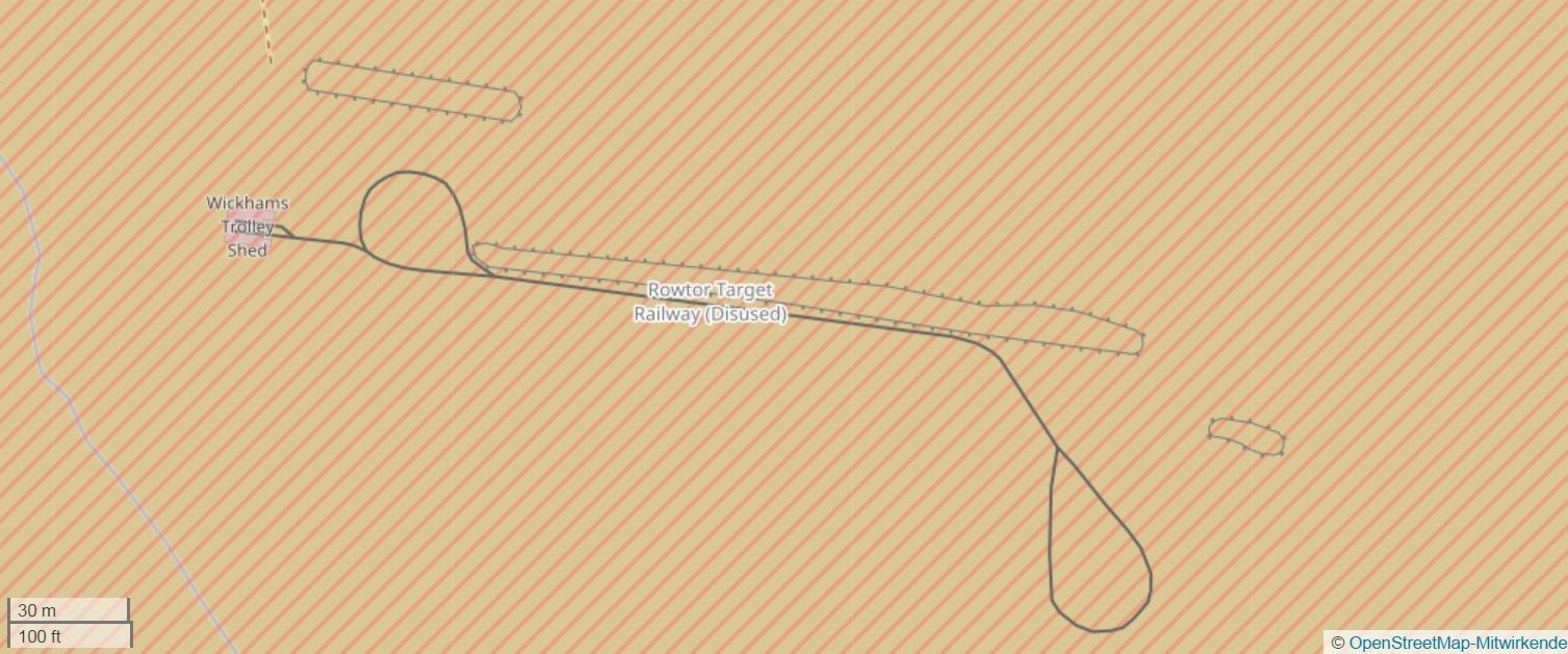 Rowtor Target Railway auf OpenStreetMap